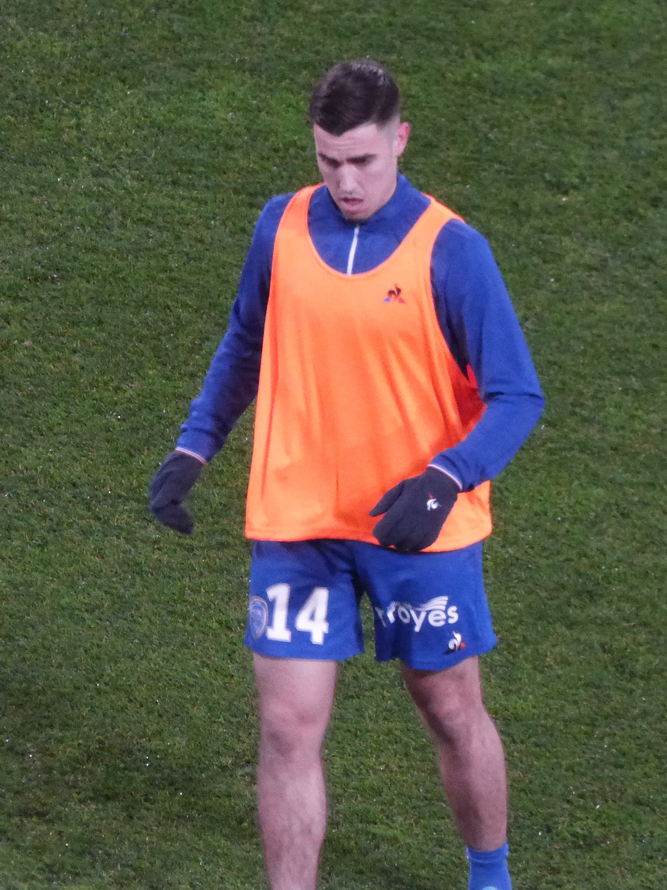 Dylan Chambost lors du match RC Lens / ES Troyes AC, comptant pour la vingt-troisième journée du championnat de France de football de Ligue 2 2019-2020, le 4 février 2020, au Stade Bollaert-Delelis de Lens